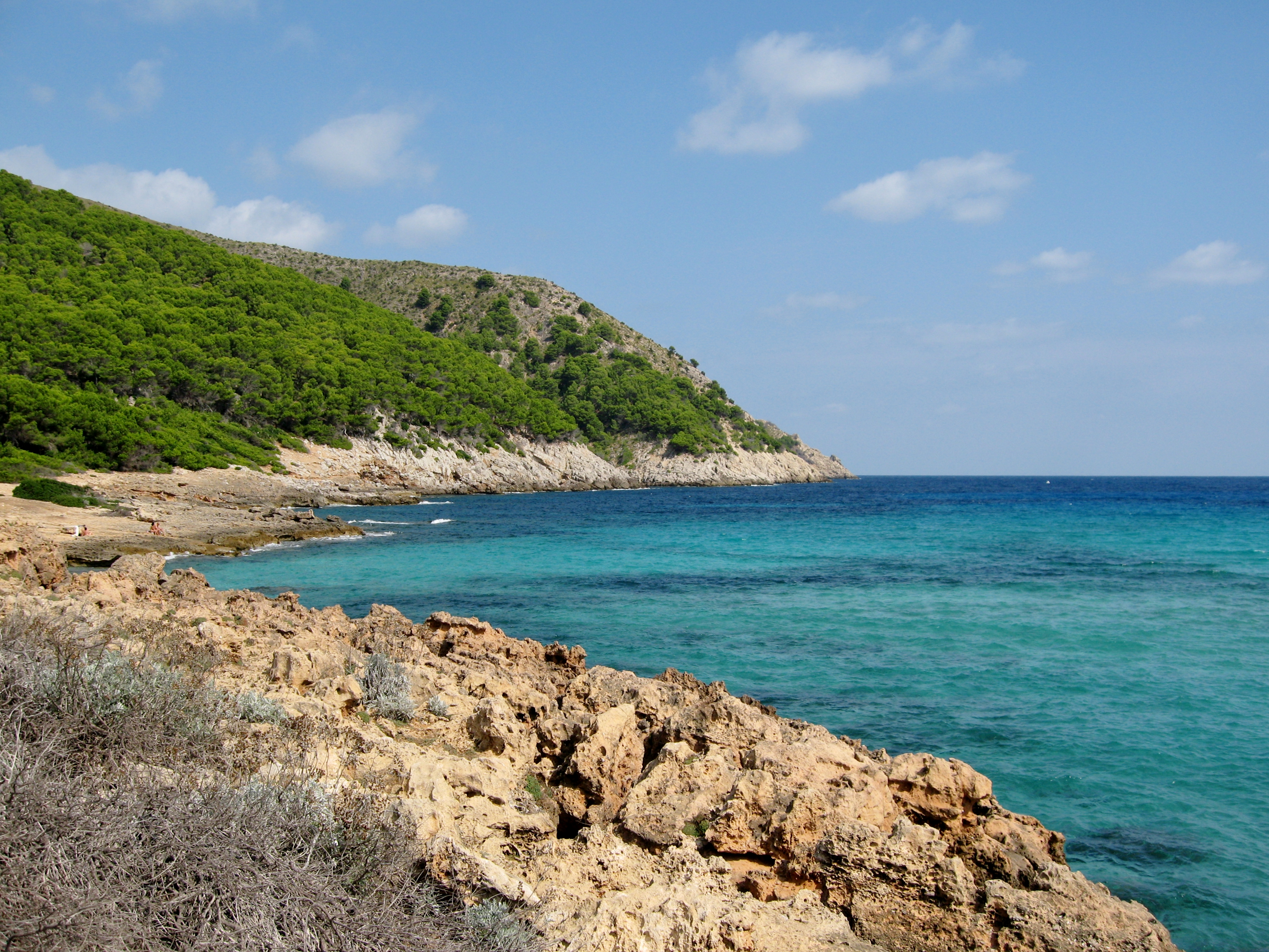 Westseite der Cala Moltó, einer Bucht in der Gemeinde Capdepera, Mallorca, Spanien